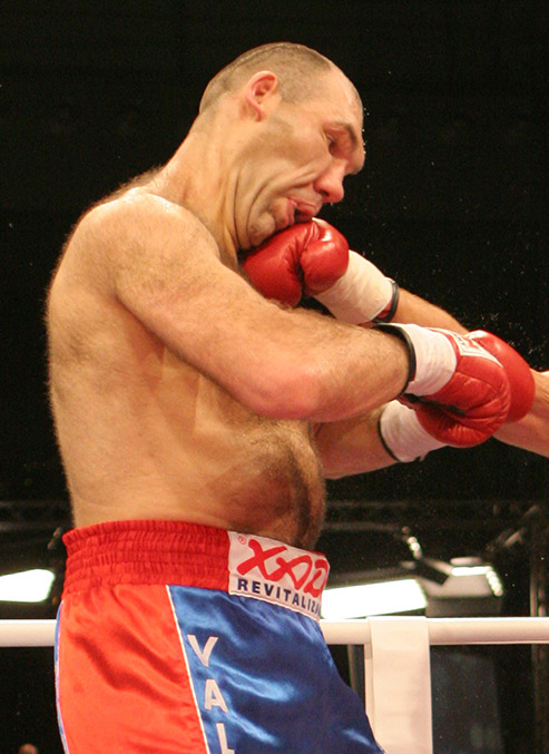 Chagaev im WM-Kampf gegen Valuev